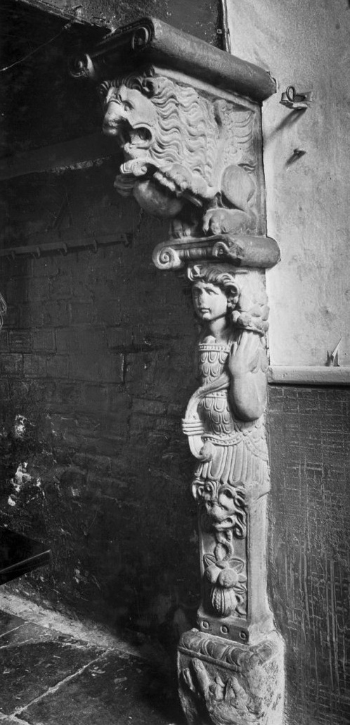 Villaertshof, schouw keuken en 1e etage